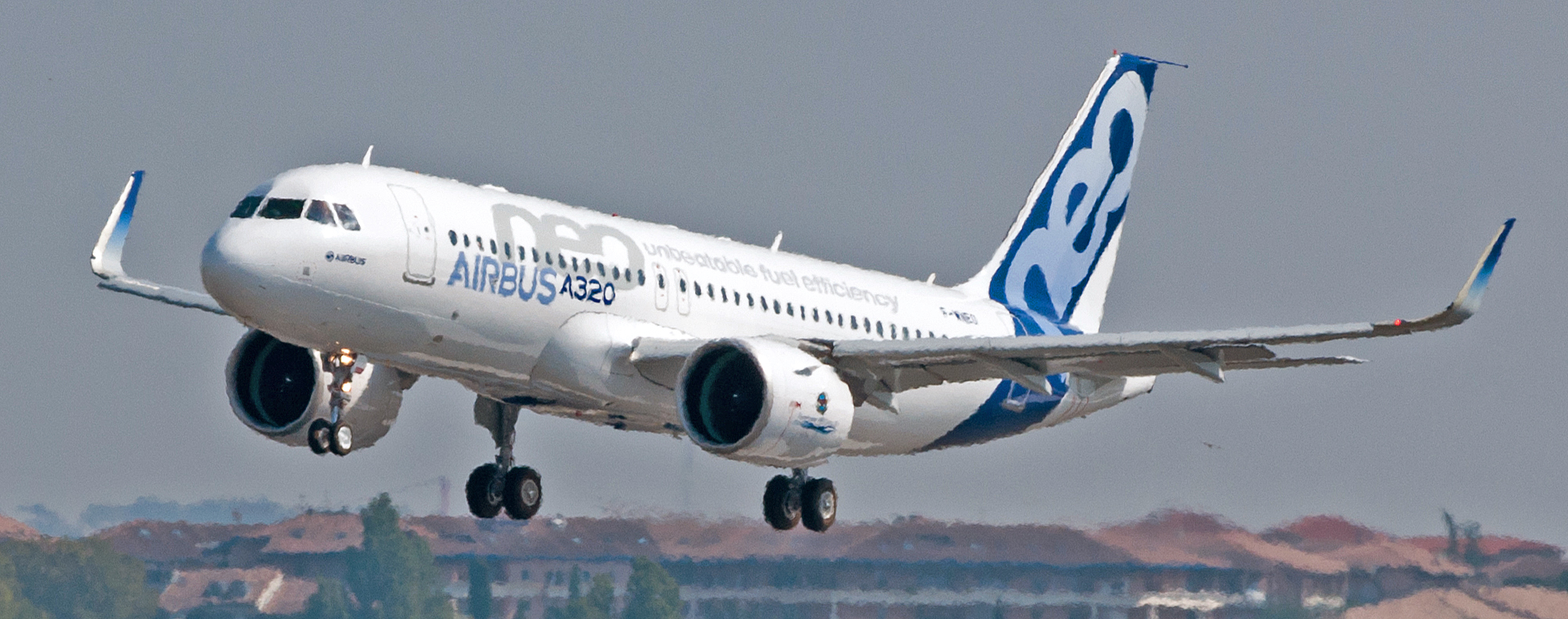 Atterrissage de l'A320neo après son premier vol